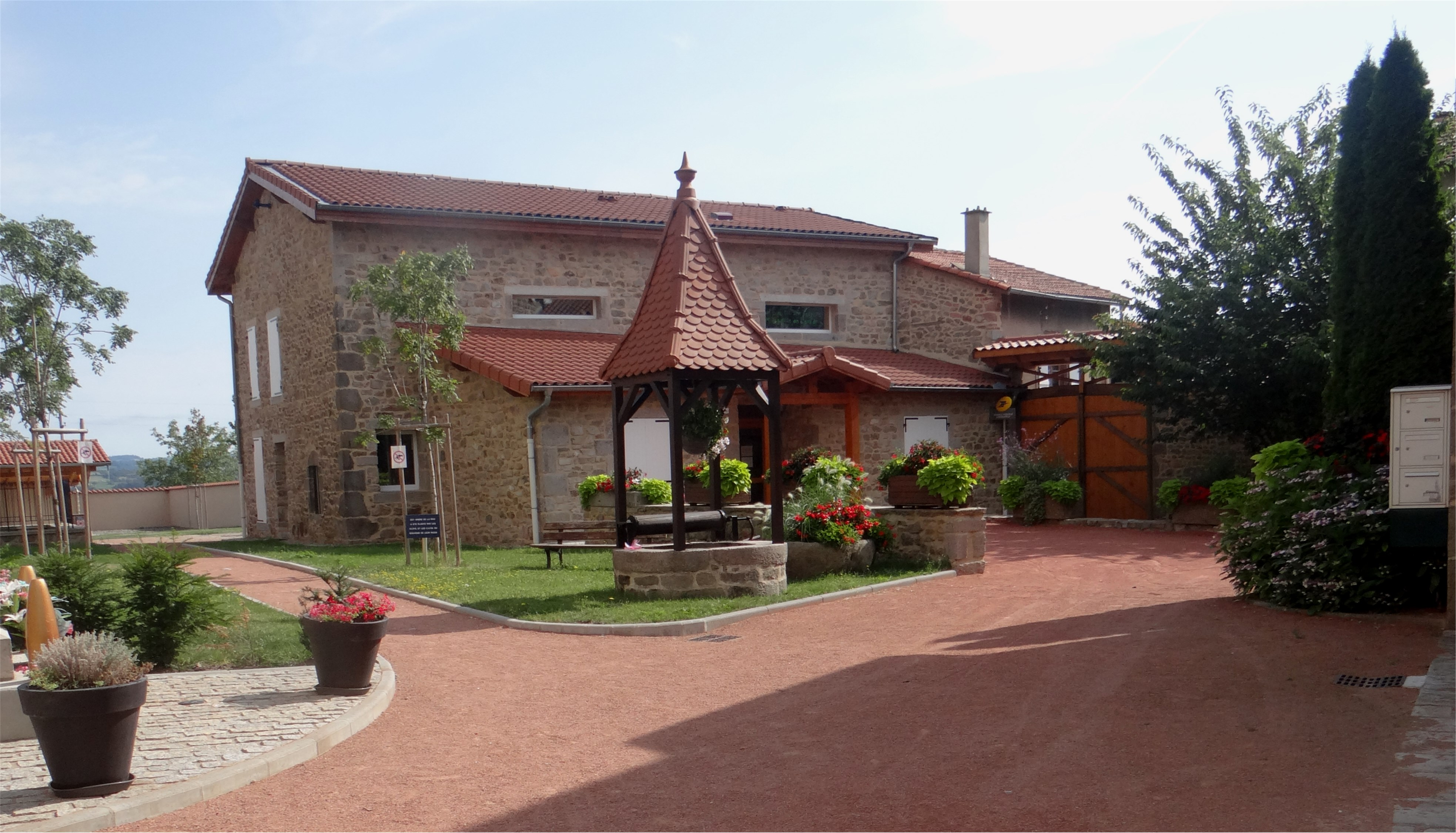 Petit puits entre l'église et la mairie, Saint-Martin-Lestra, Loire, France.